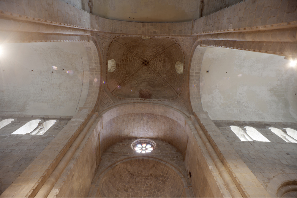 unidentified Spain